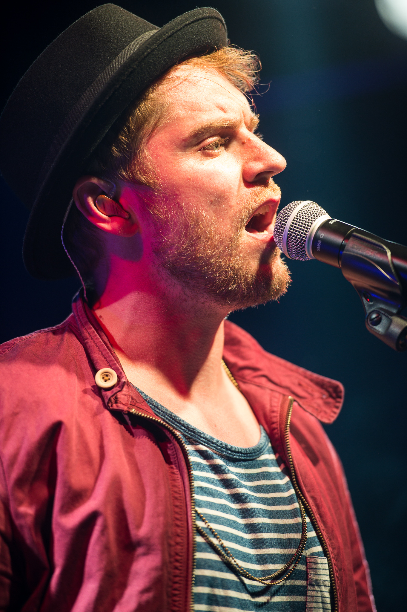 Concertbüro Franken,Der Hirsch,Johannes Oerding,Konzert,Livekonzert,Livemusik,Musik